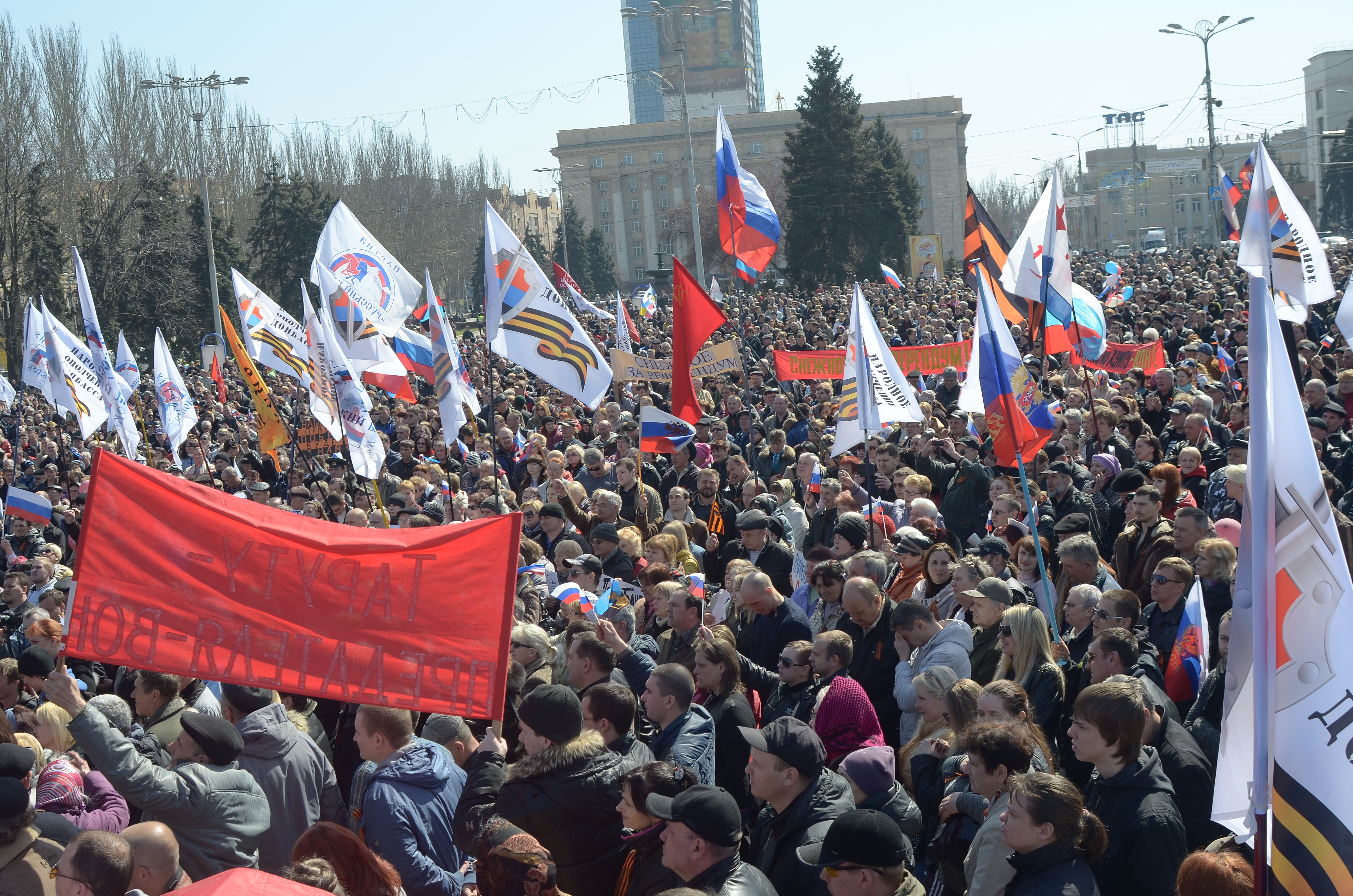 Протесты в Донецке